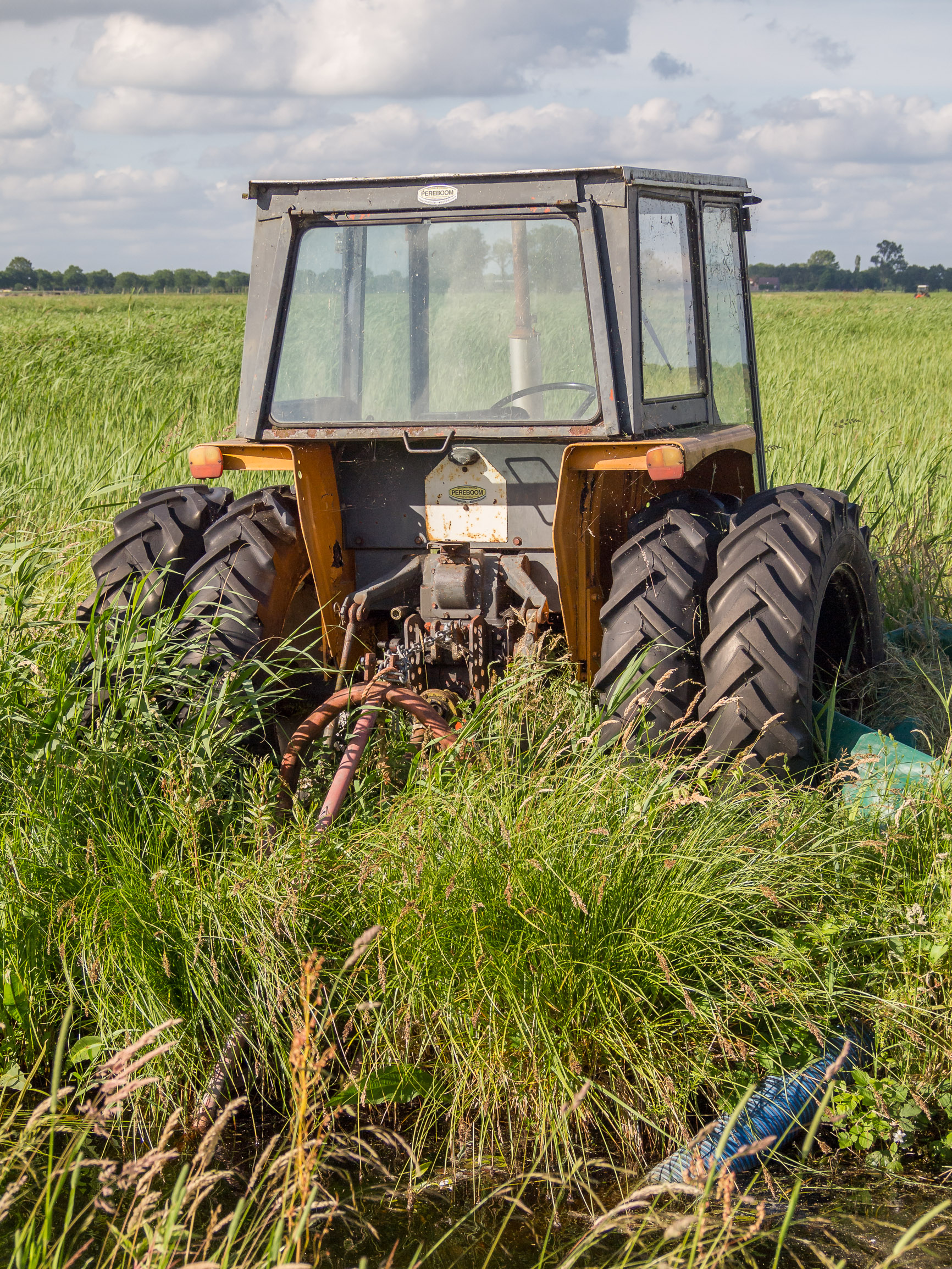 Tractor met waterpomp This is a photo or sound file made in De Weerribben-Wieden National Park in the Netherlands, with the main subject of the file in the category: humans in nature